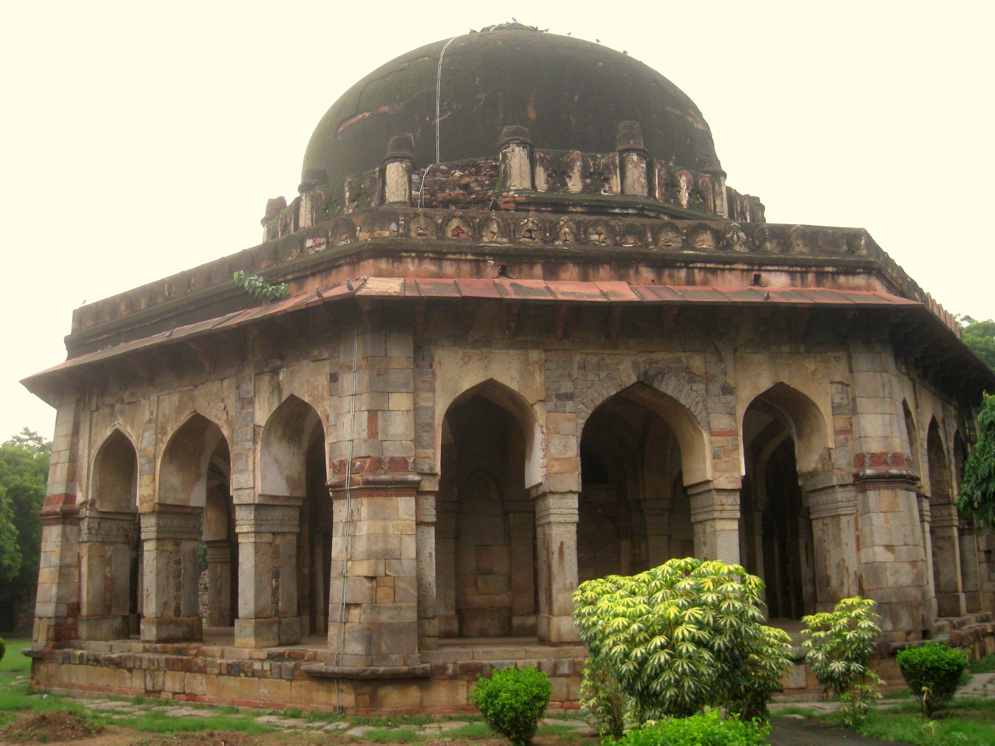 Sikander Lodi's Tomb, in Lodi Gardens at dawn, New Delhi, India.